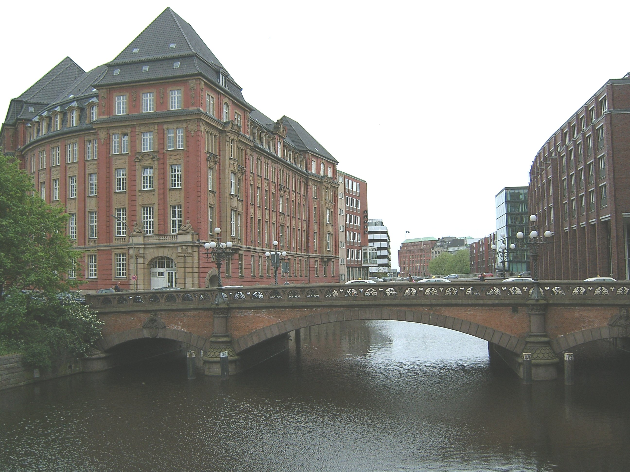 Die Heiligengeistbrücke wurde 1883 bis 1885 nach Plänen von Franz Andreas Meyer erbaut. Sie überspannt das Alsterfleet und stellt so die Verbindung zwischen Altstadt und Neustadt in Hamburg her. Links liegt die Oberfinanzdirektion, 1907 bis 1912 von Albert Erbe erbaut, rechts das neue Steigenberger-Hotel.